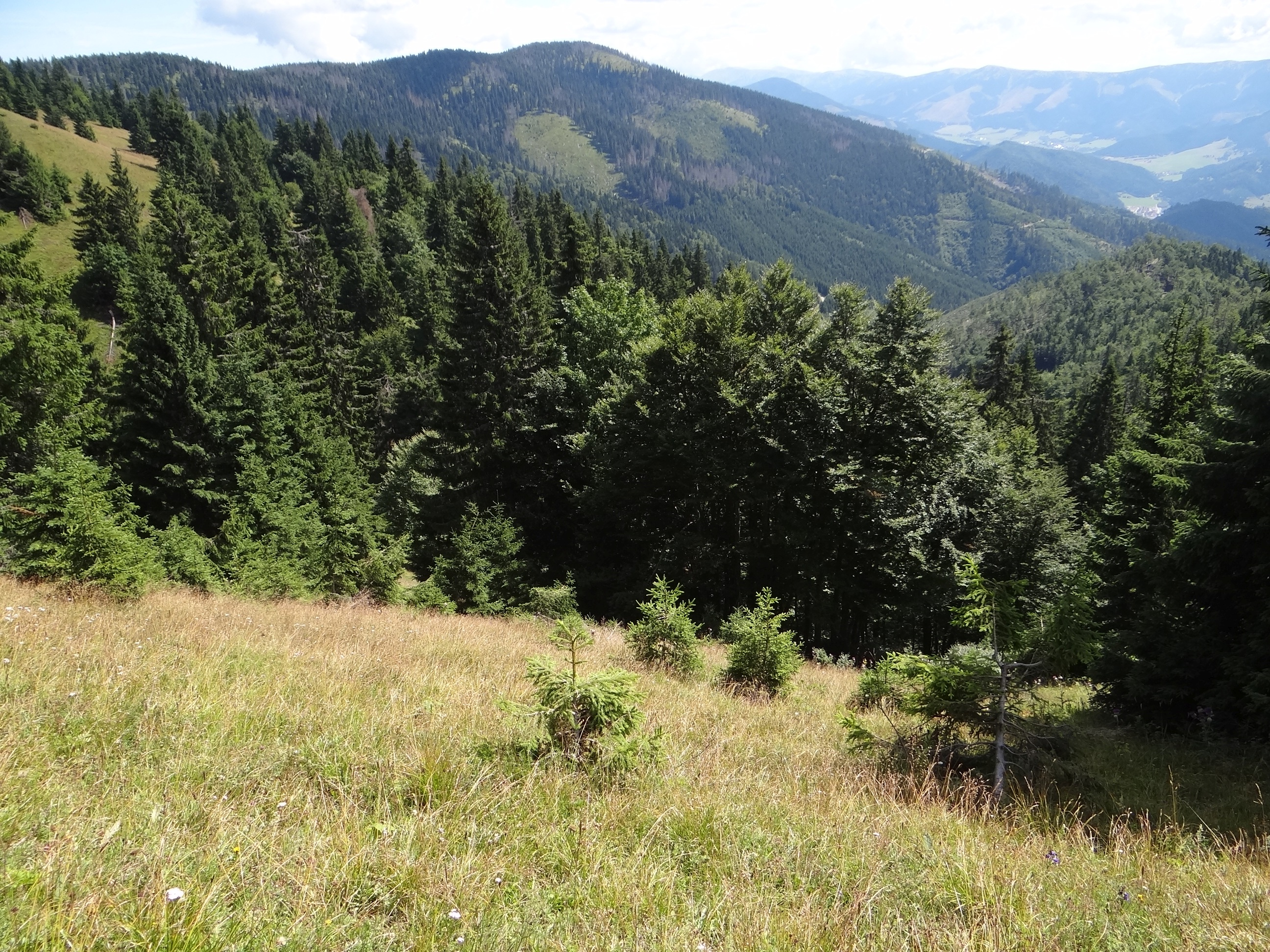 Smrekovica i Skalné. View from Skalná Alpa